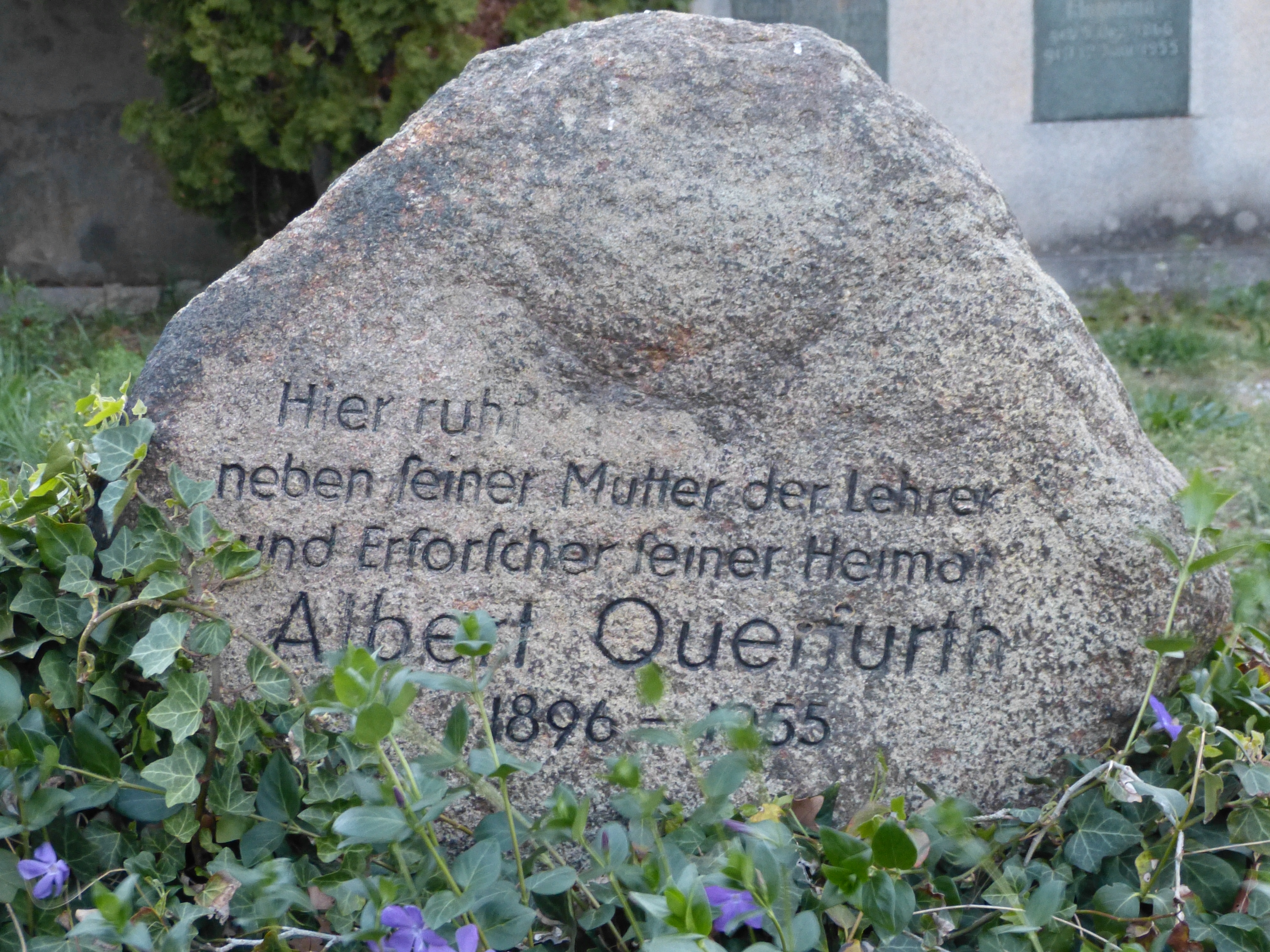 Schköna, Friedhof, Grab von Albert Querfurth